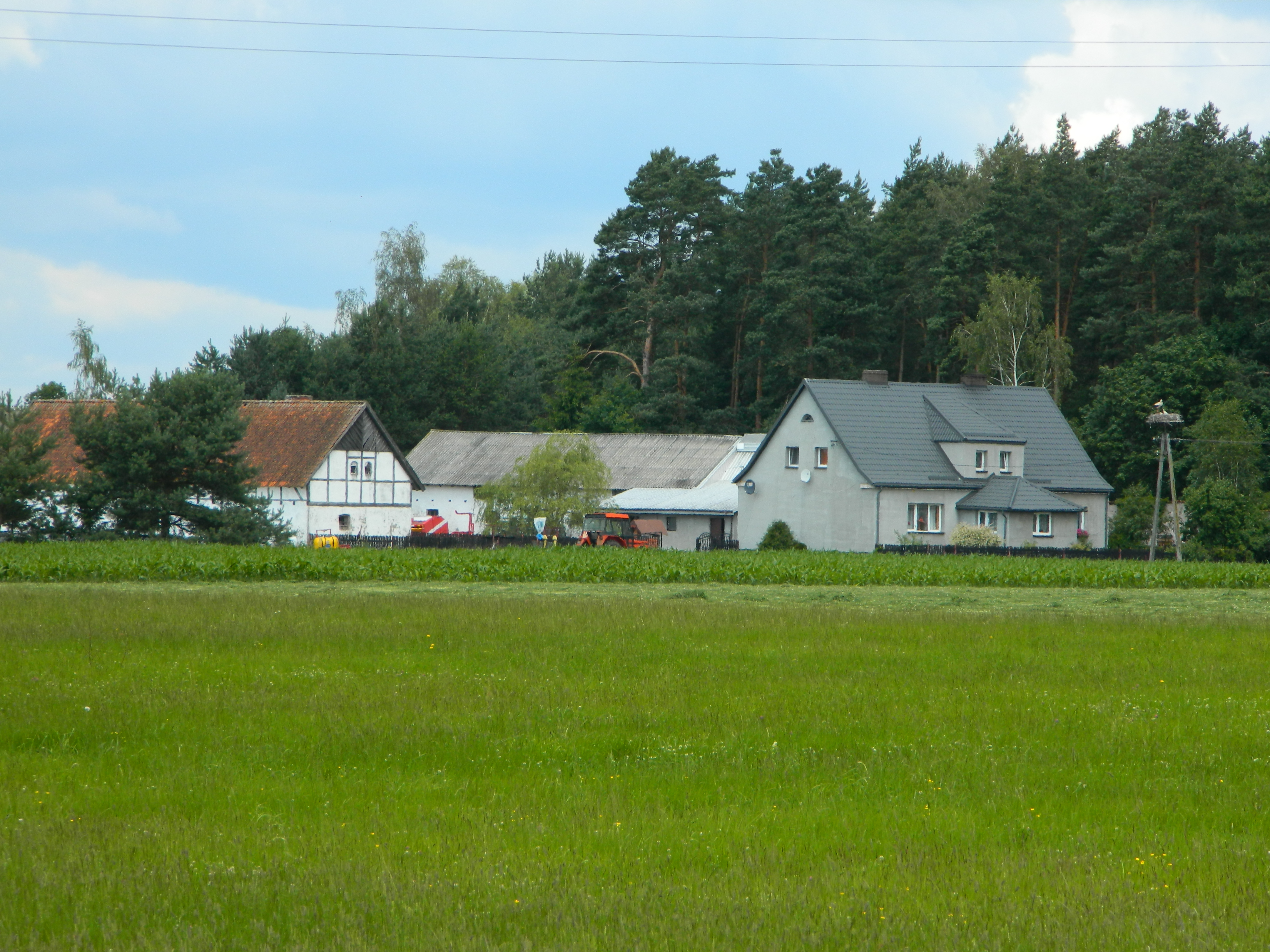 Wilamowo 61 - bocianie gniazdo